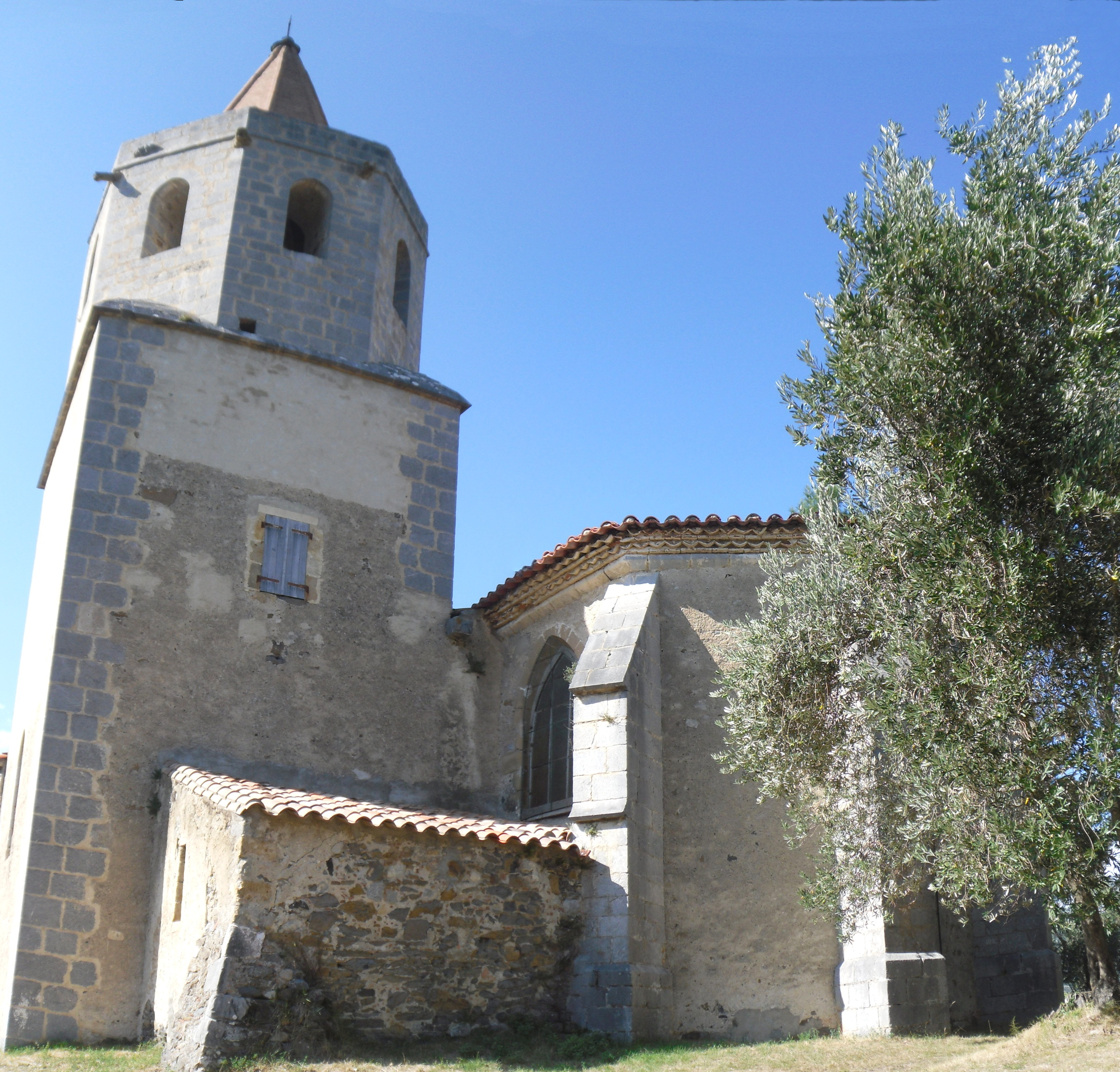 Eglise Notre-Dame-de-Laval à Caudiès-de-Fenouillèdes